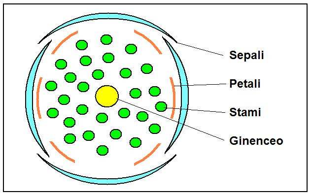 Actaea spicata – Diagramma fiorale